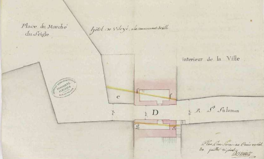 Titre : Projet d'alignement de la rue Saint-Salomon à Vannes. Intitulé : Lettres de renvoi au procès-verbal. Plume, encre de Chine, encre rouge, lavis et aquarelle. Date extrême début : 1783 Date : 18e siècle, fin Lieu-dit : Saint-Salomon (rue) / Grand marché (place) / Marché du Seigle (place) / Vileyé (hôtel particulier) Format : 023,3 x 36,8